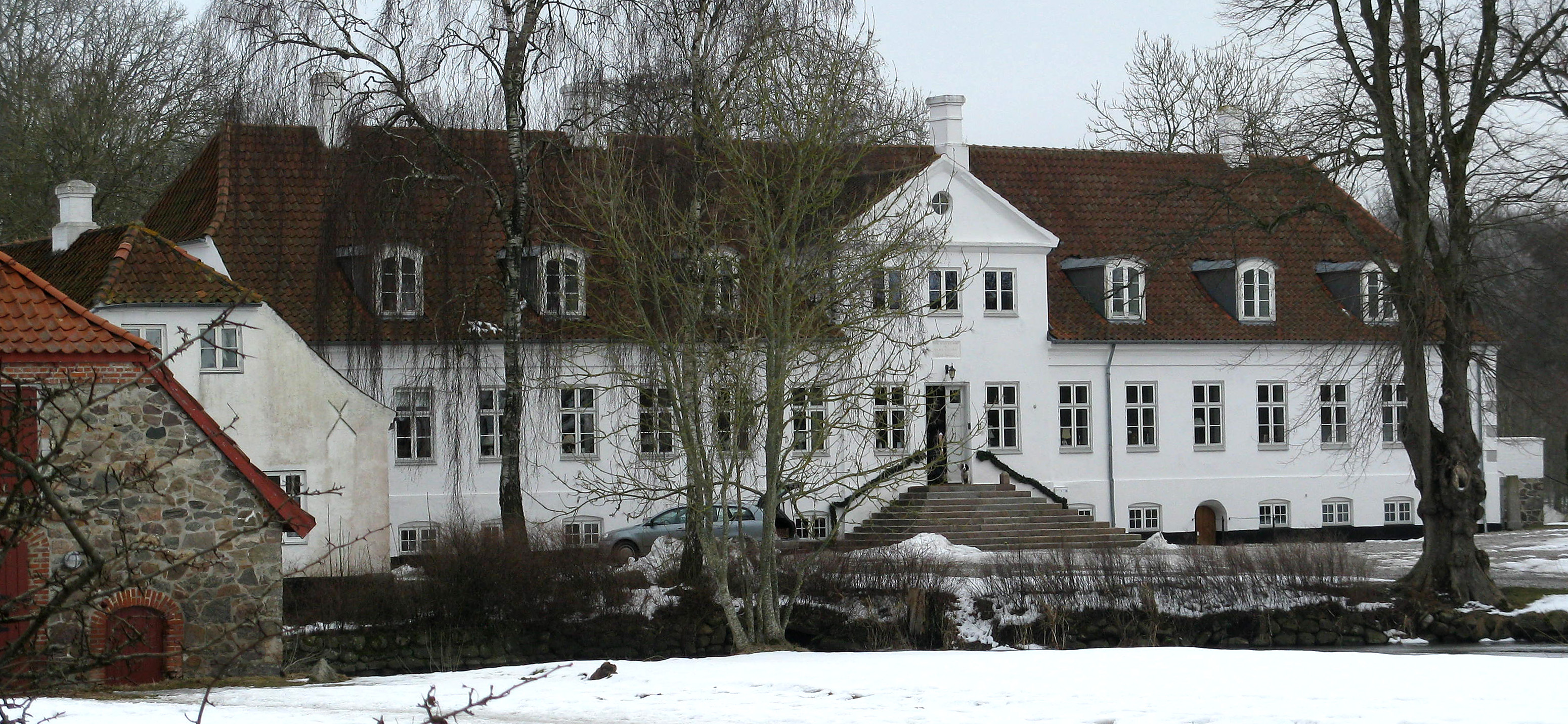 Østergård i Tulstrup Sogn i Århus Kommune. Gården set fra vest